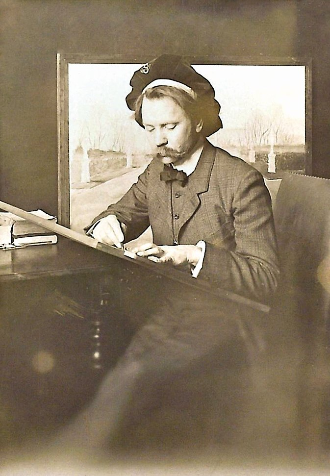 Лявон Вітан-Дубейкаўскі за працай